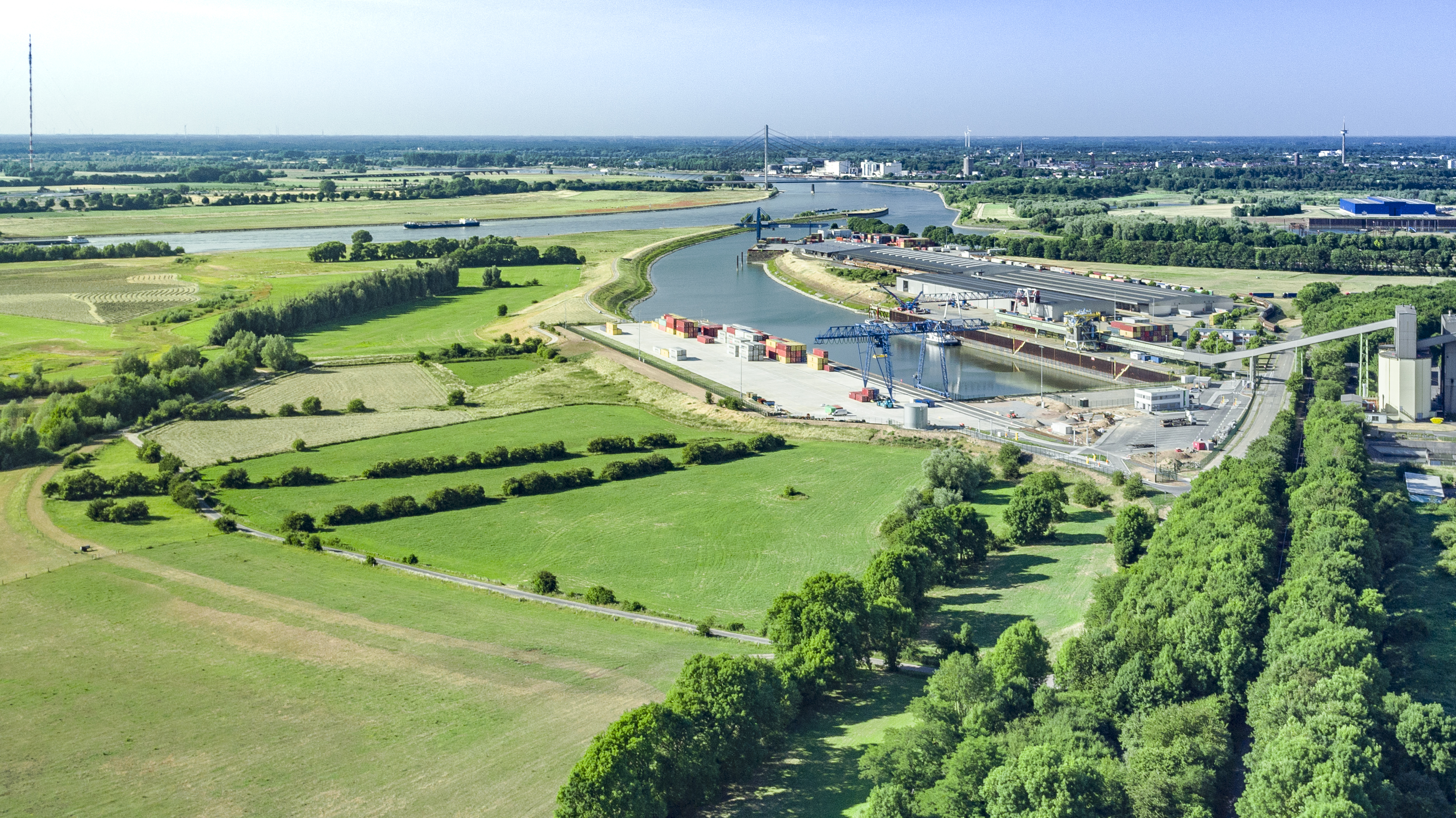 Die drei Häfen von DeltaPort: Hafen Emmelsum, Rhein-Lippe-Hafen Wesel, Stadthafen Wesel